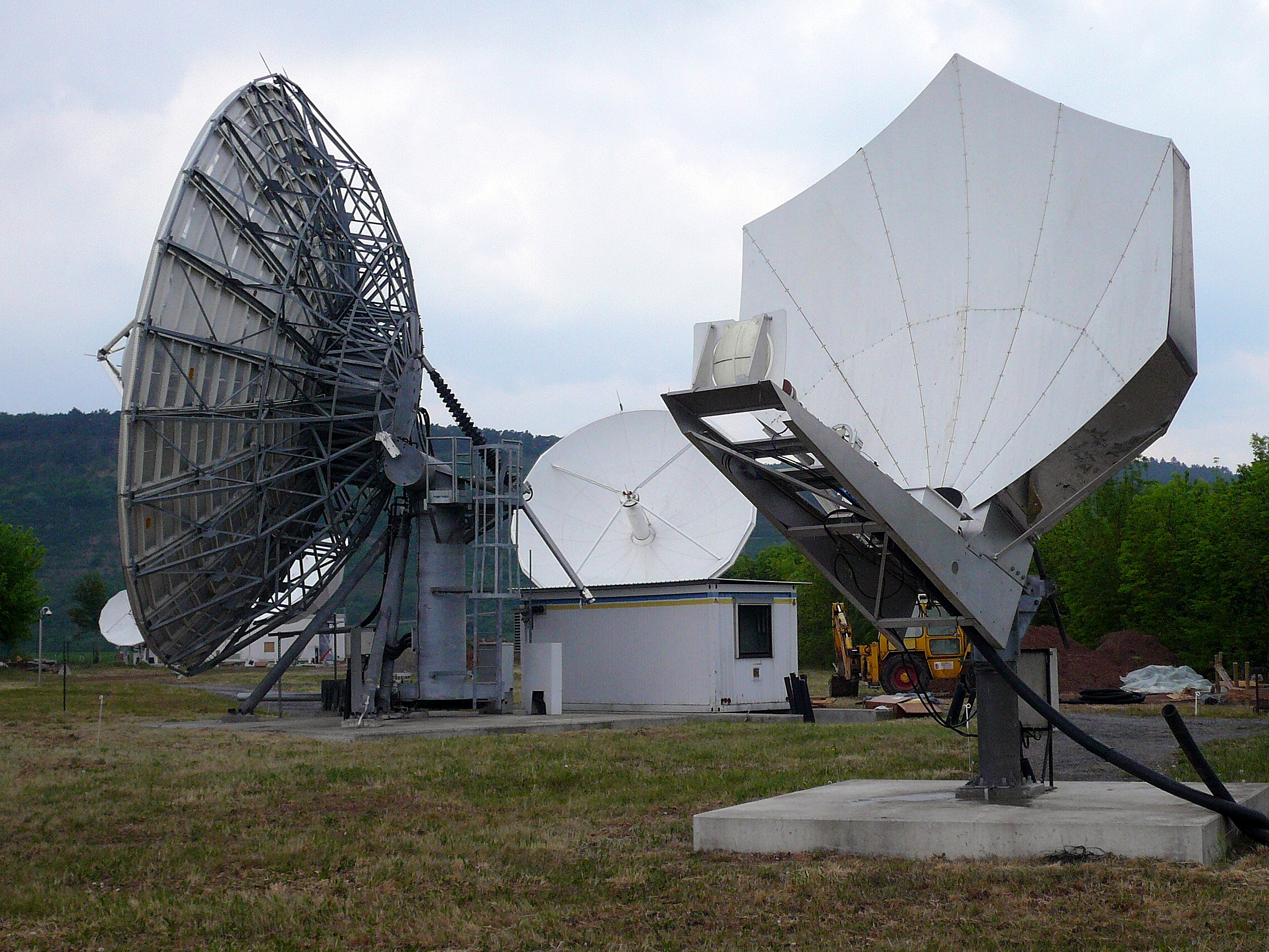 Satellite ground station Fuchsstadt, Deutschland, aerialfield one